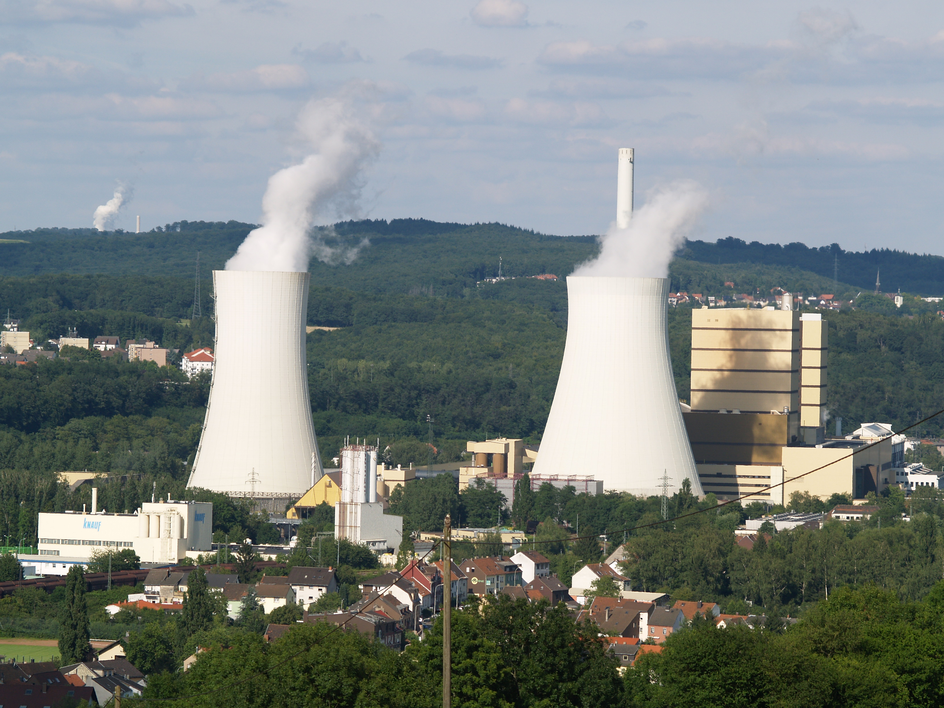 Kraftwerk Völklingen/Fenne